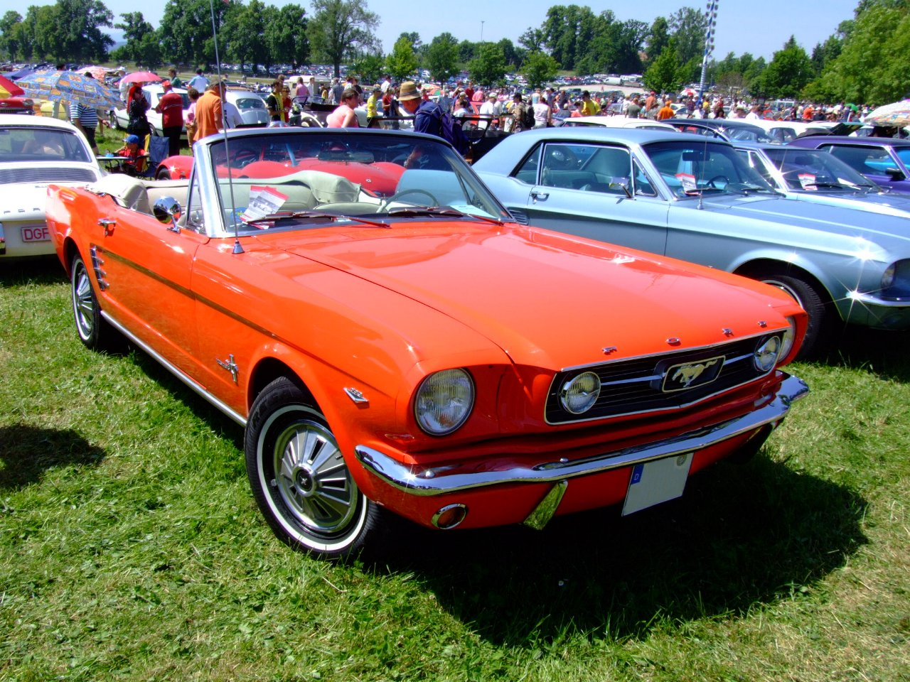 Ford Mustang Cabrio Baujahr: 1966 289ci(4,7 l) V8 Motor mit ca. 147 kW (200 PS)